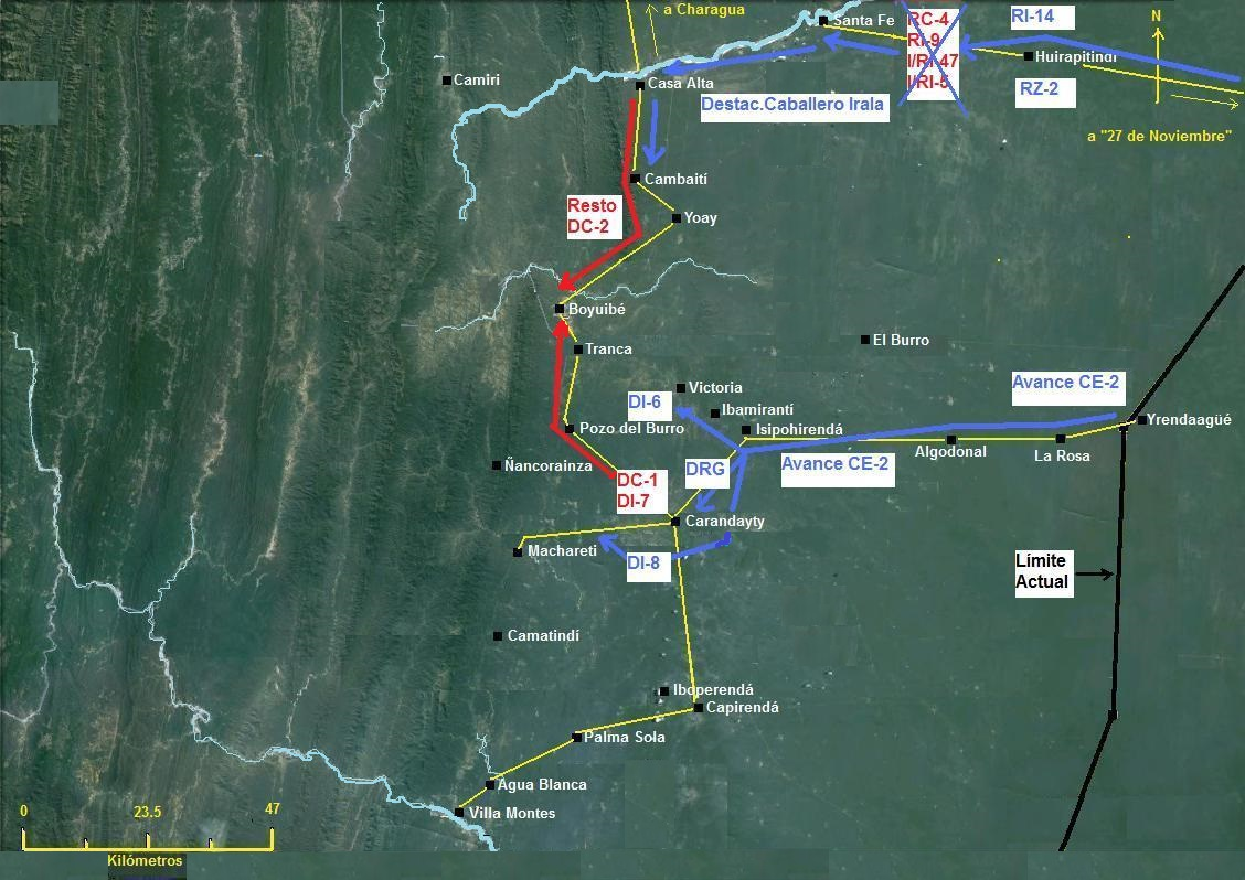 Avance del CE-2 paraguayo hacia Carandayty y retirada boliviana hacia Boyuibé enero 1935